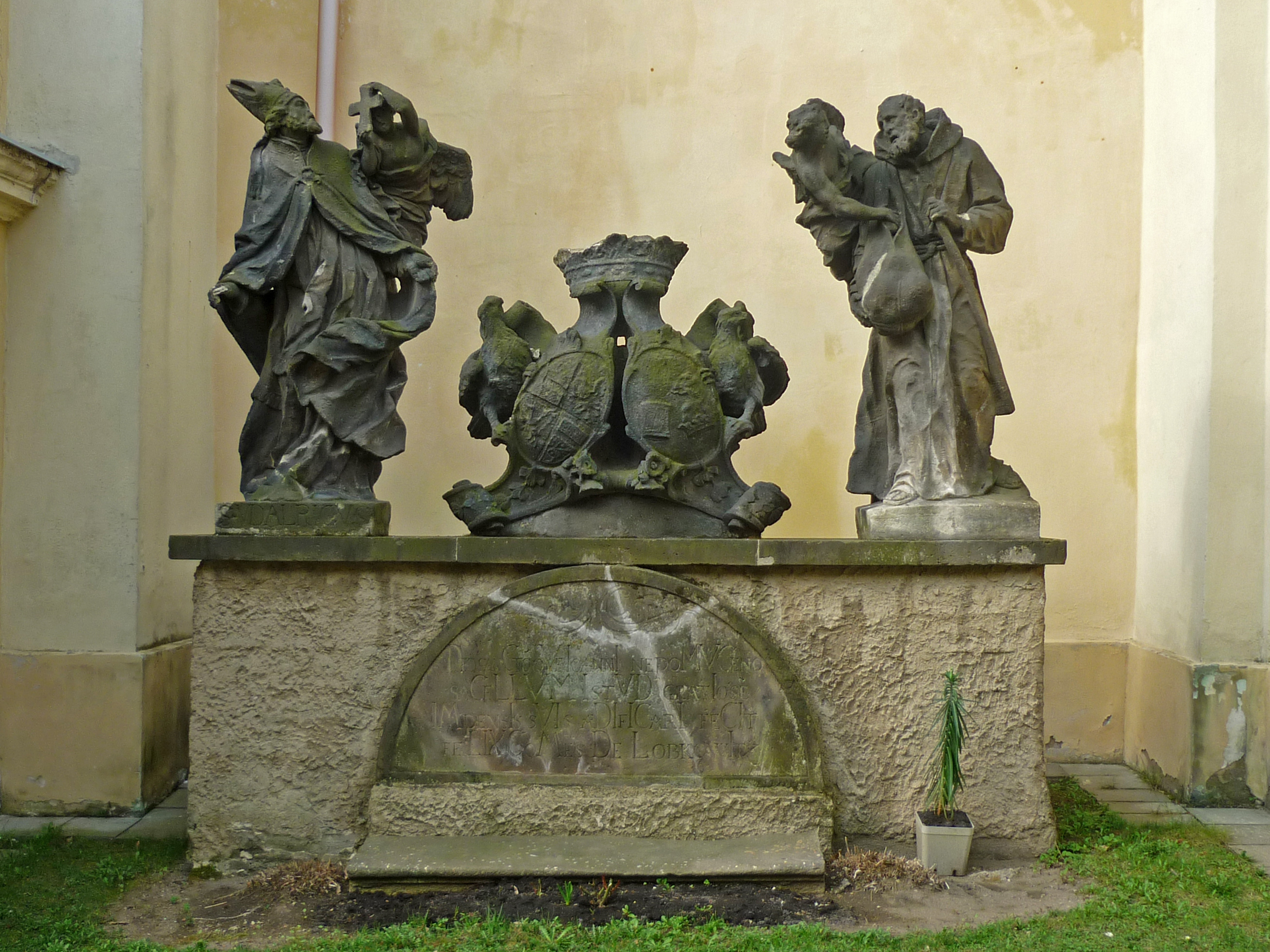 Skulpturengruppe an der Dekanatskirche in Oberleutensdorf (Litvínov): Statuen des hl. Ulrich (von Johann Adam Dietz) und des hl. Felix von Cantalice (von Franz Anton Kuen) (rechts) mit Allianzwappen Lobkowicz-Bubna (1712)